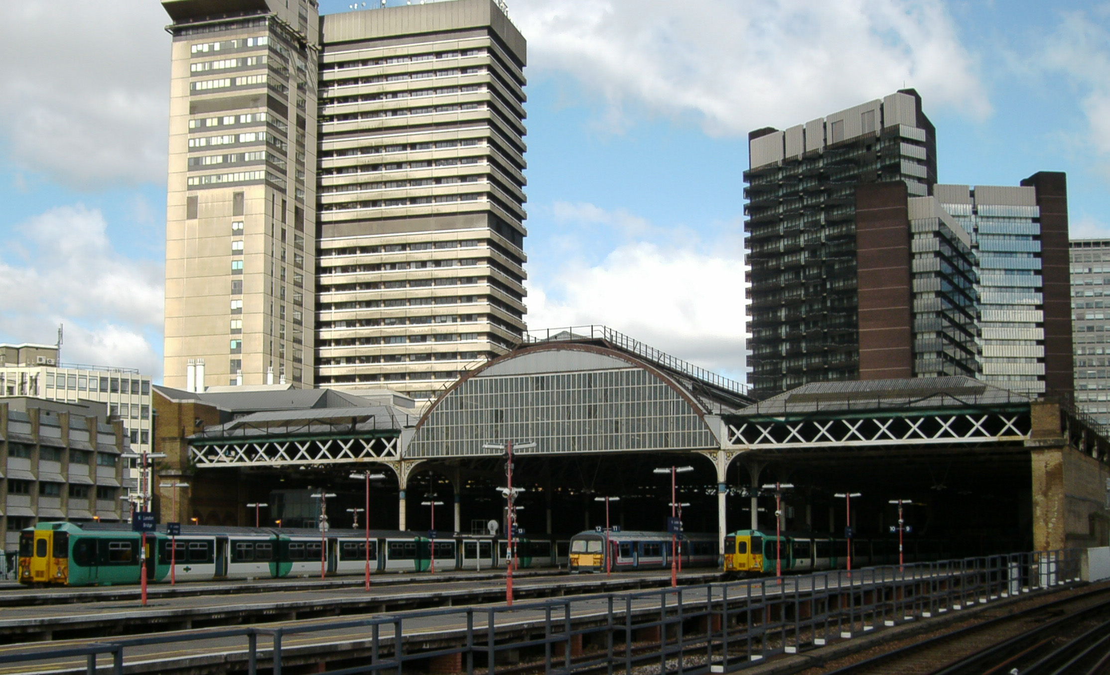 London Bridge Station - Kopfgleise mit Zügen von Southern und First Capital Connect